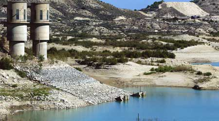 Fotografía del Embalse de la Pedrera